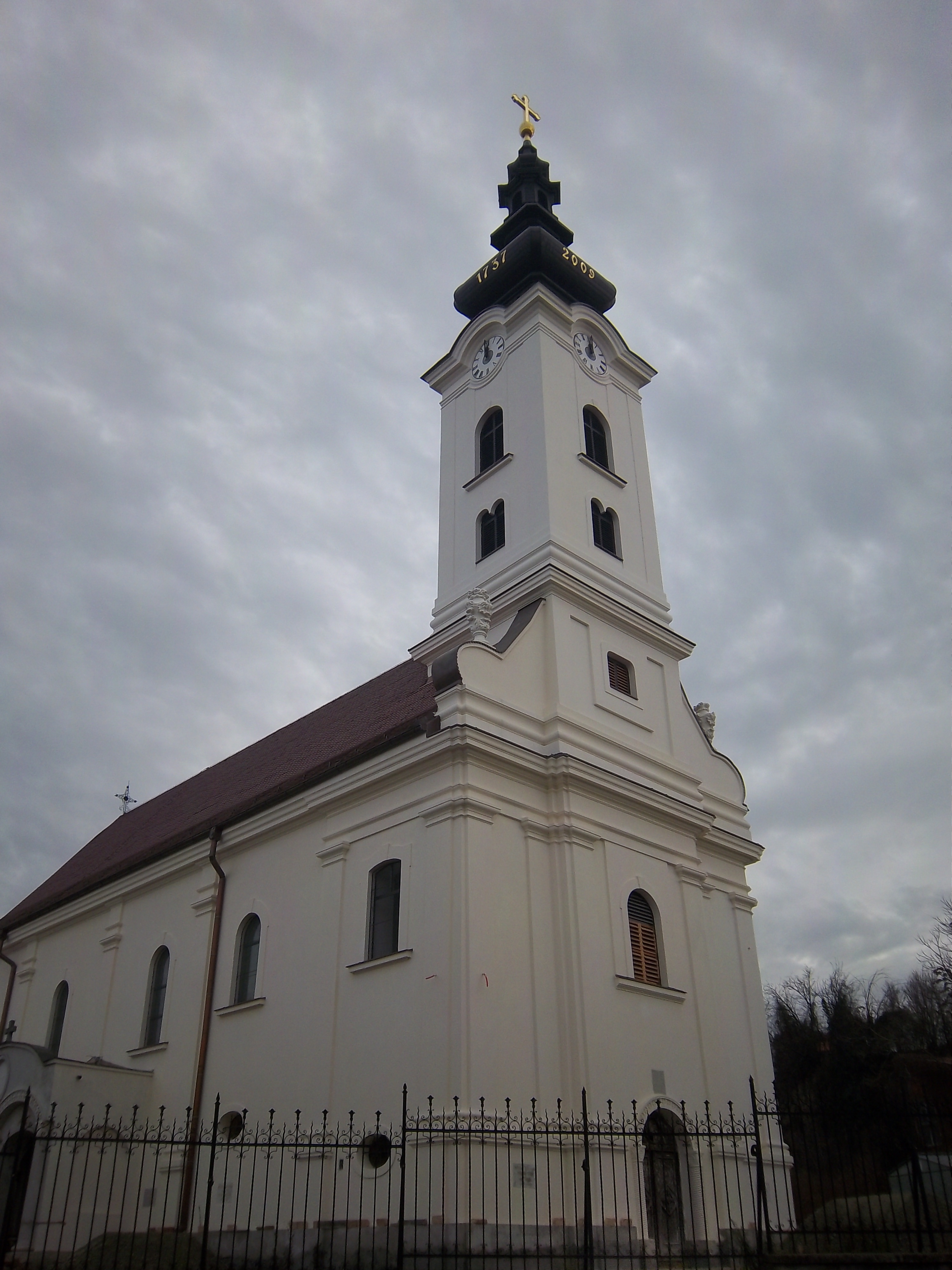 Pravoslavna crkva u Vukovaru